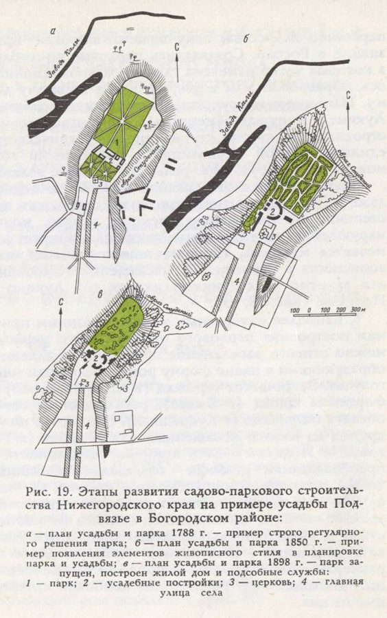 Парк усадьбы Приклонских-Рукавишниковых